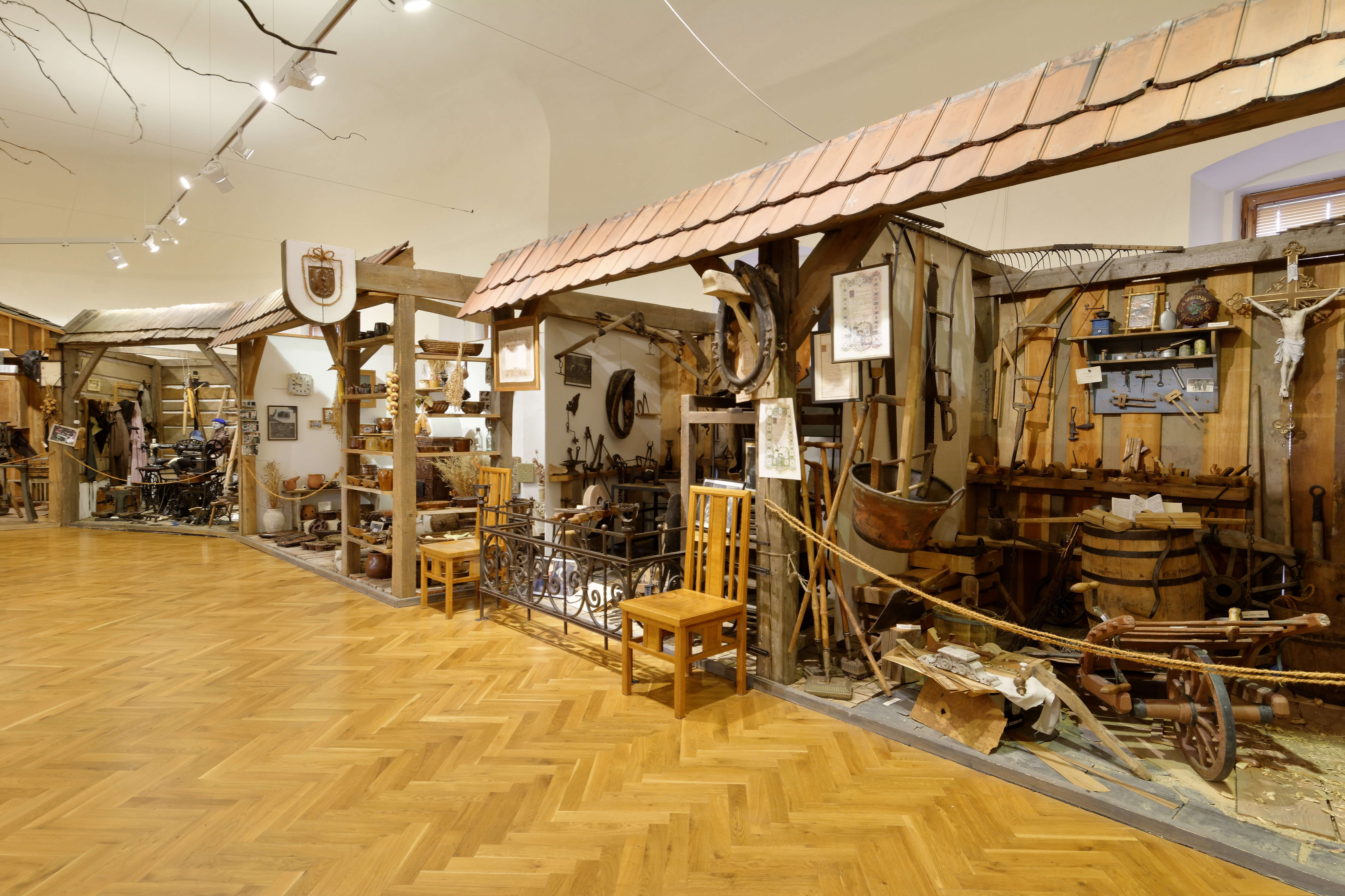 Muzeum v Litovli, pohled do expozice.